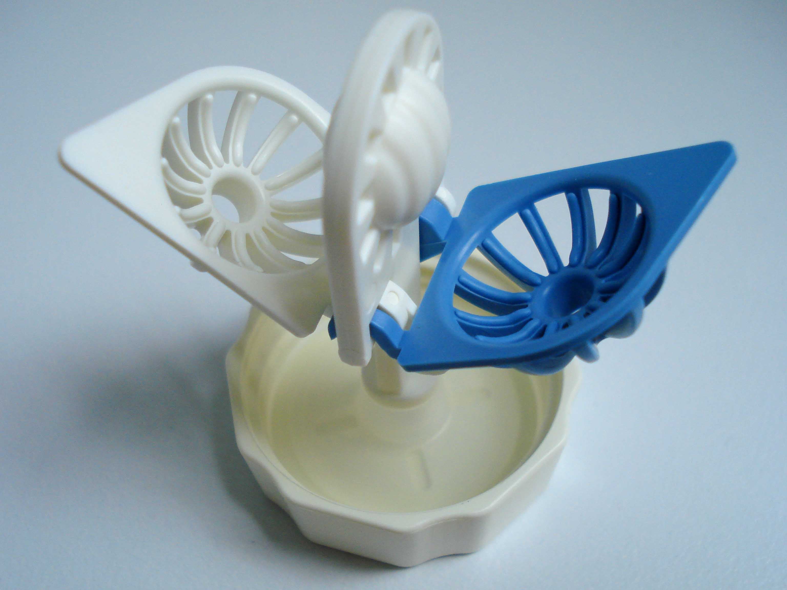 Container for contact lenses